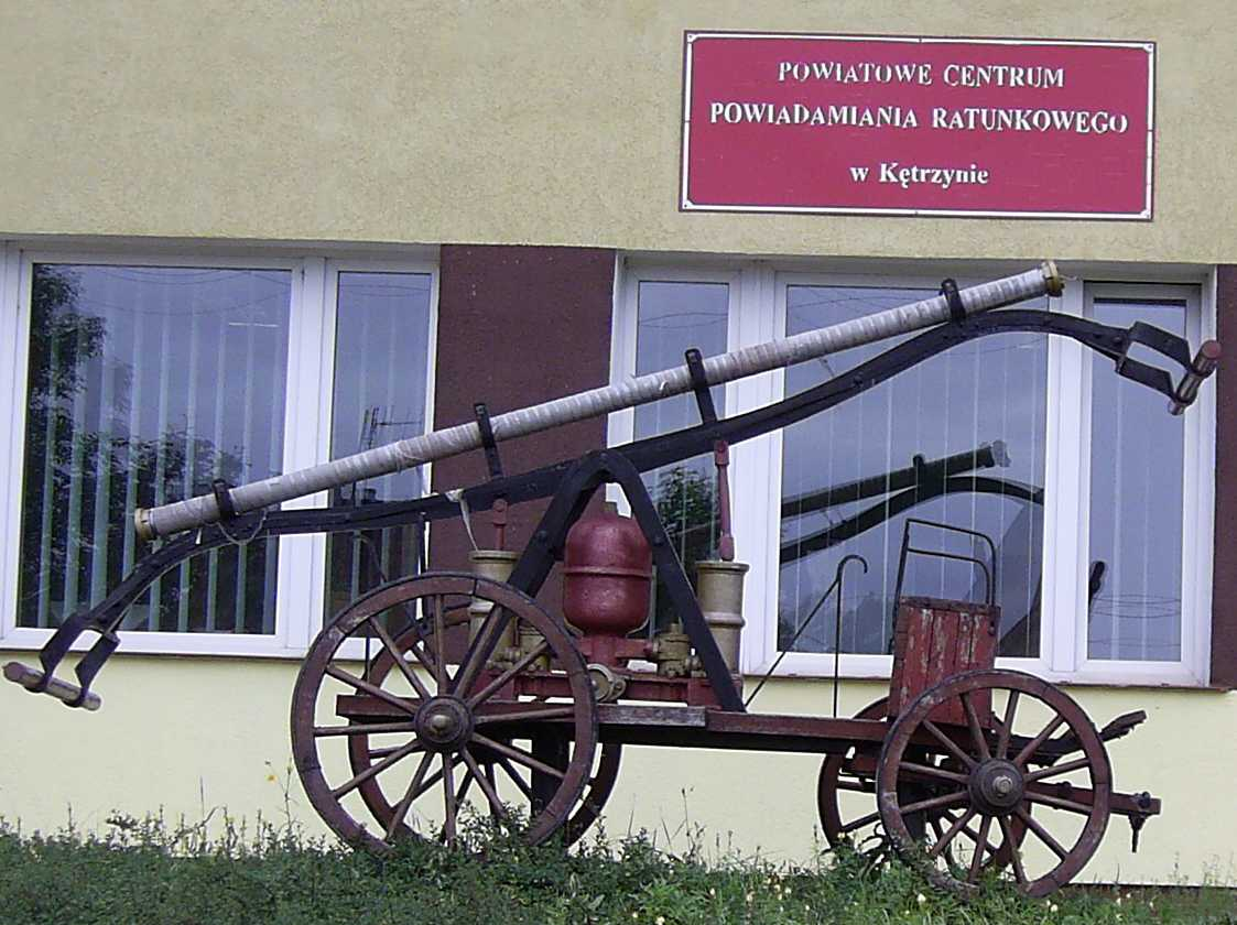 Wóz strażacki w Kętrzynie.